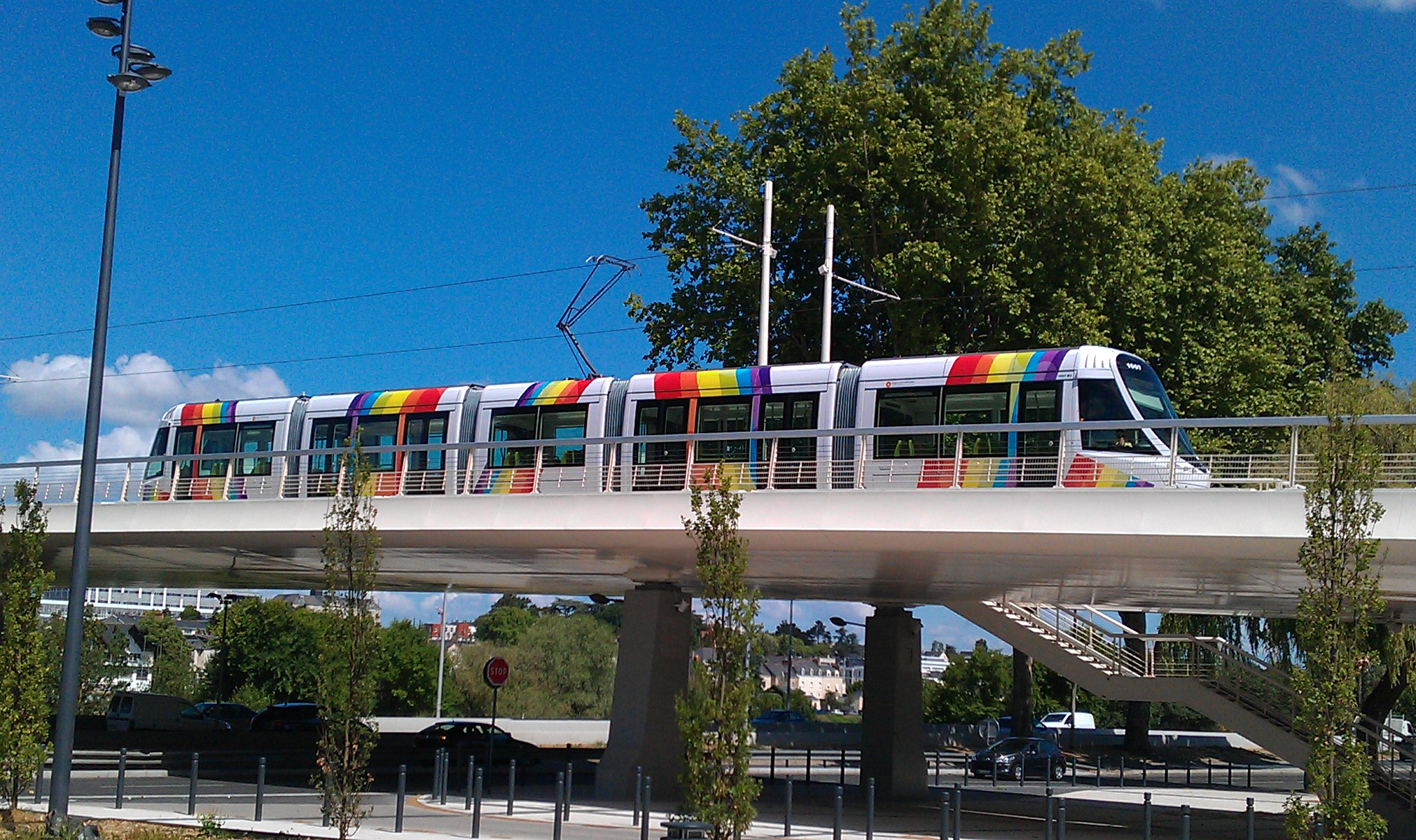 Tramway d'Angers sur le pont Confluences